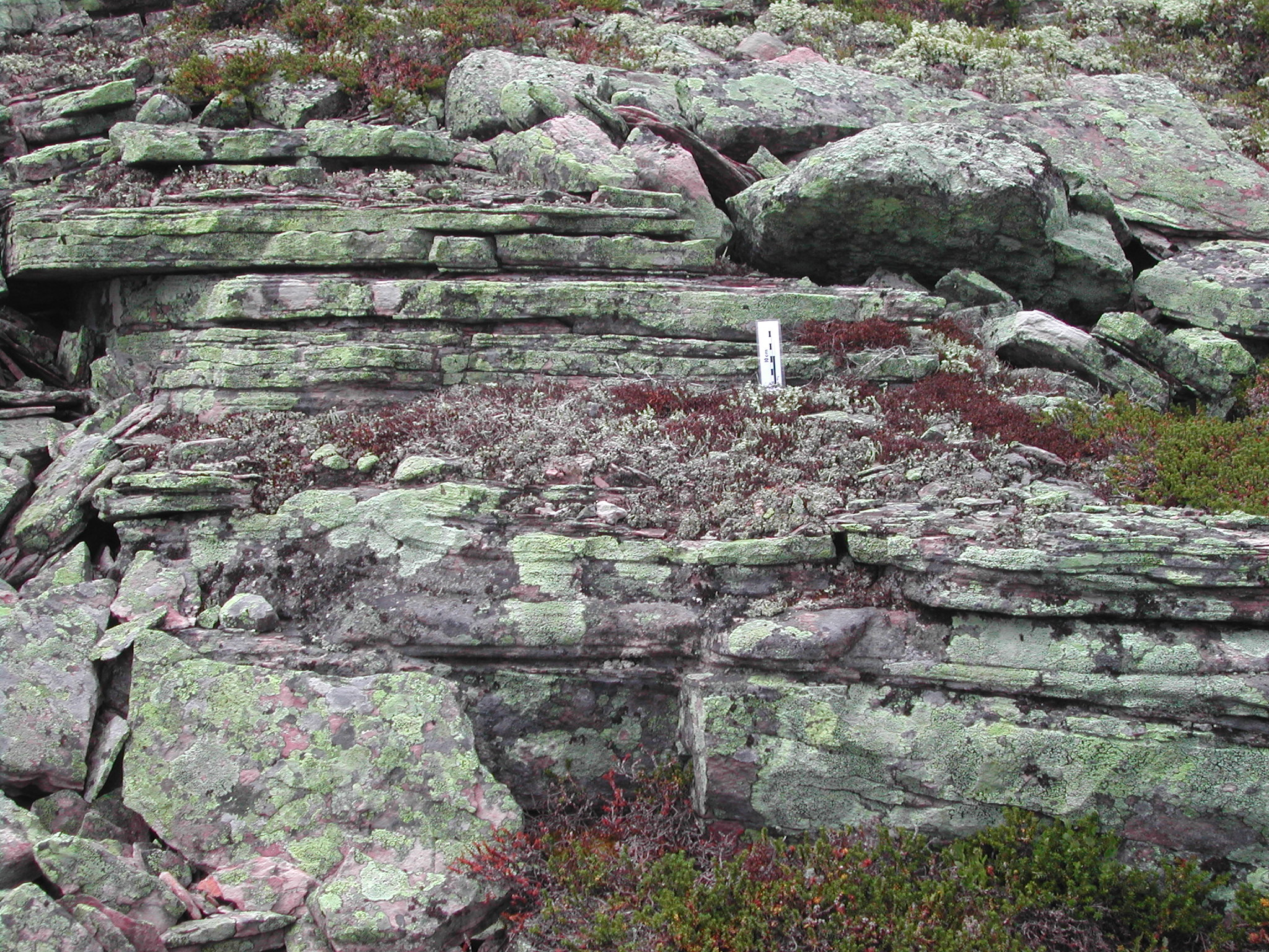 Sandstone layers by Rörsjöhön on Fulufjället plateau